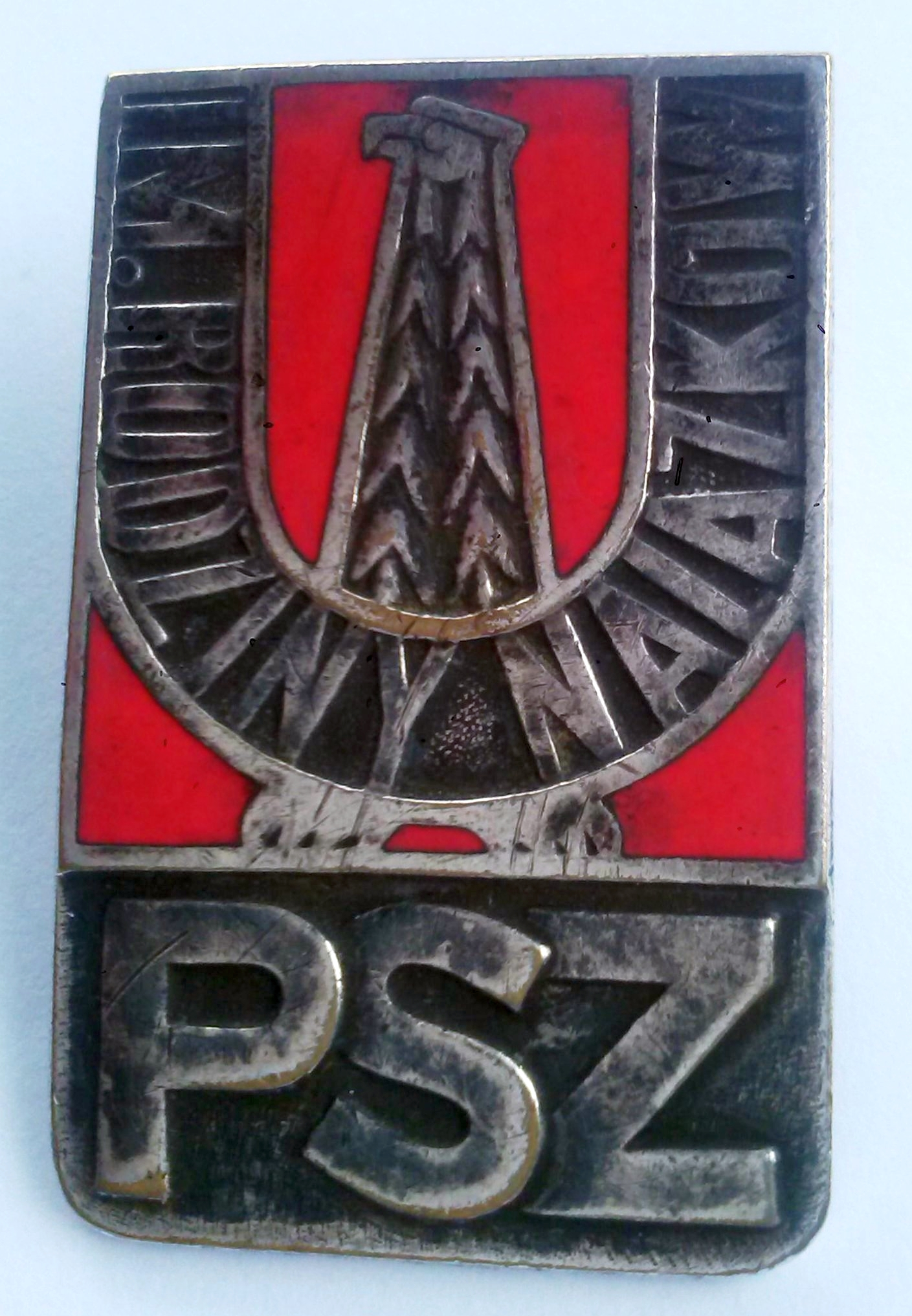 Odznaka absolwenta PSZ im. Rodziny Nalazków